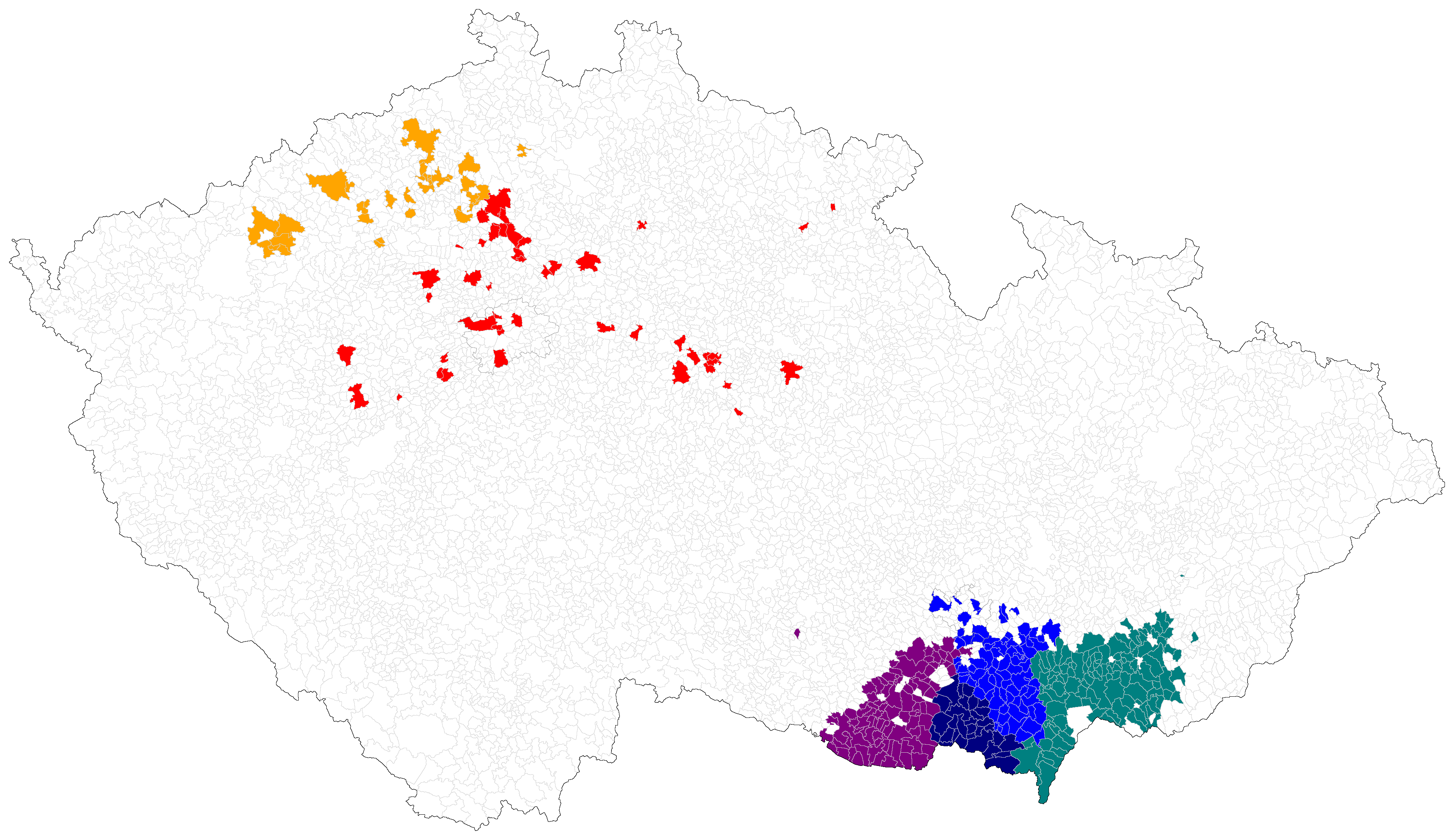 Mapa vinařských oblastí Čechy a Morava a jejich podoblastí v České republice (podle § 4 vinařského zákona č. 321/2004 Sb. a její prováděcí vyhlášky č. 254/2010 Sb. se vinařské oblasti skládají z podoblastí, které jsou tvořeny obcemi, v Praze a Brně městskými částmi, na jejichž území se nachází viniční tratě).